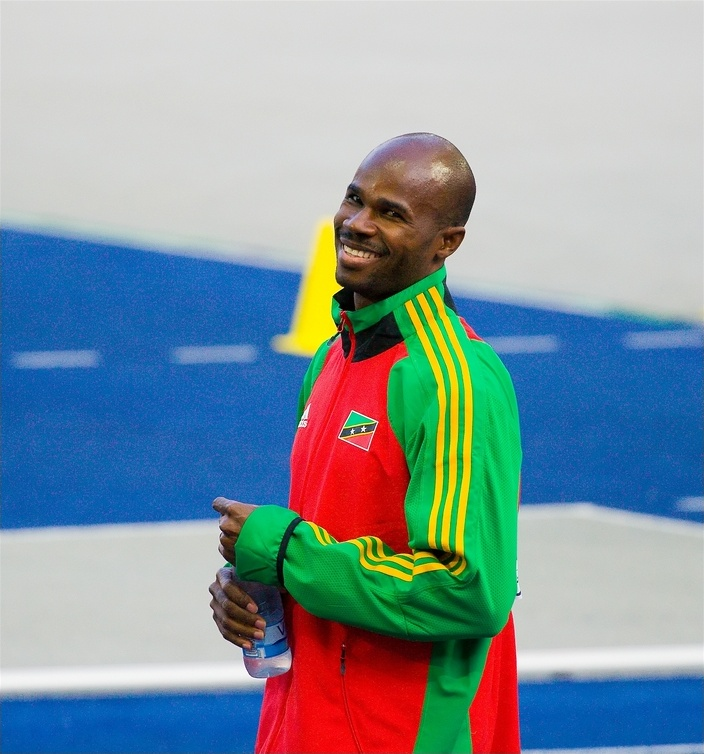 Kim Collins - ehemaliger 100m Weltmeister